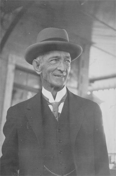 ירושלים - סיר וולטר שאו יו"ר ועדת החקירה